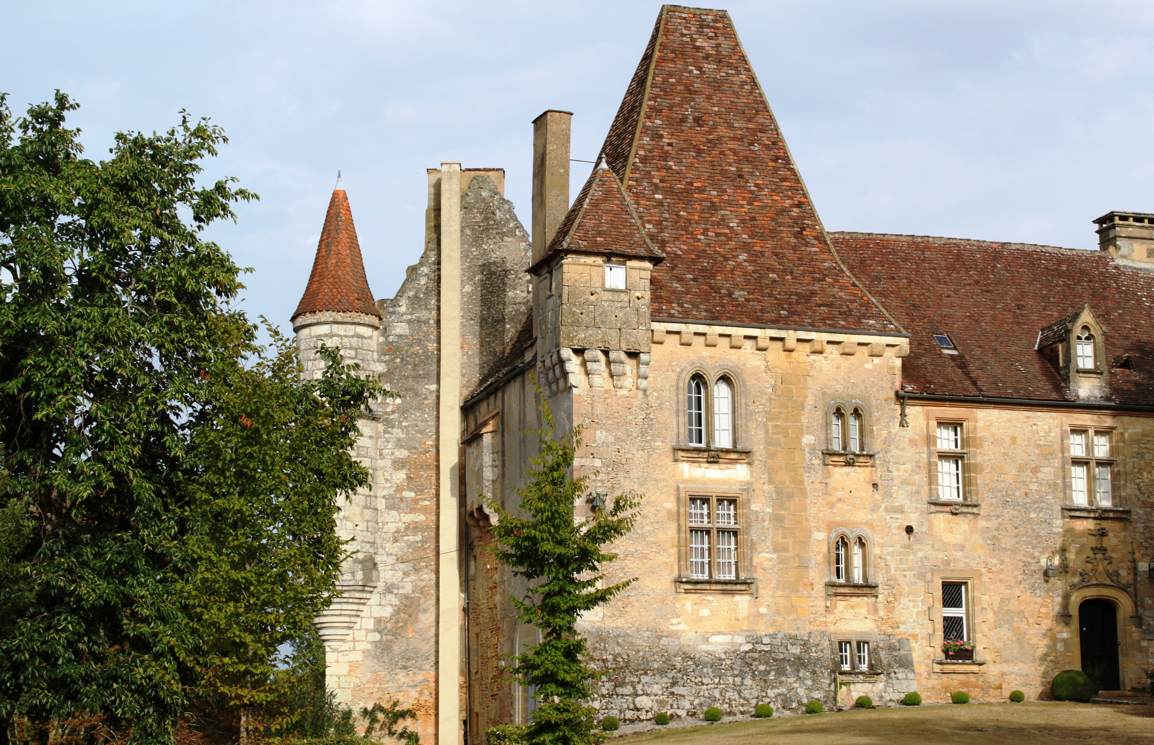 Le château de Monsec, Mouzens (Dordogne)